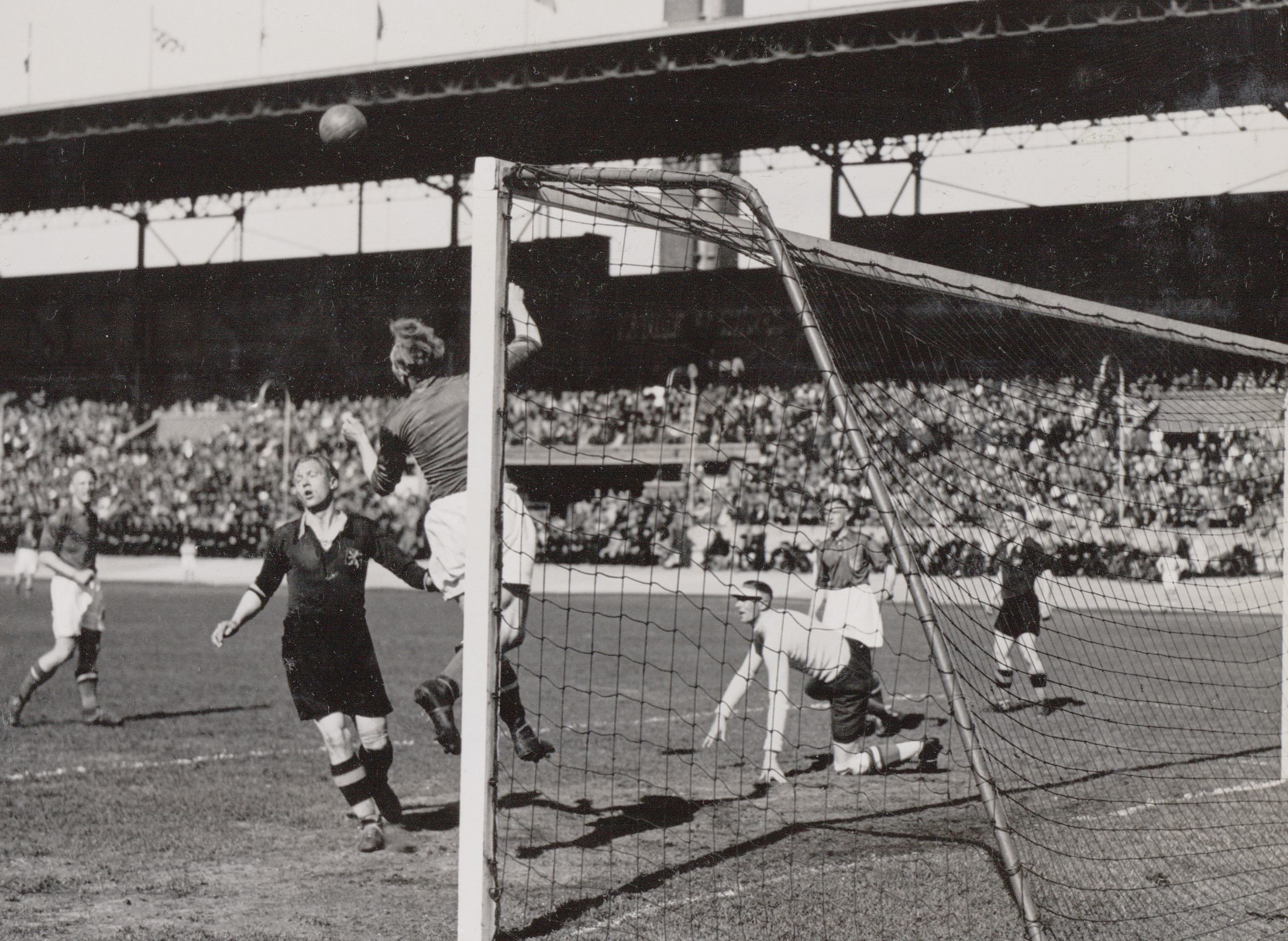 Het Nederlandse doel in gevaar. Doelman Adri van Male is geslagen, maar Joop van der Heide brengt koppend redding. Nederland - België (4-2), gespeeld op 21 april 1940 in het Olympisch Stadion te Amsterdam.